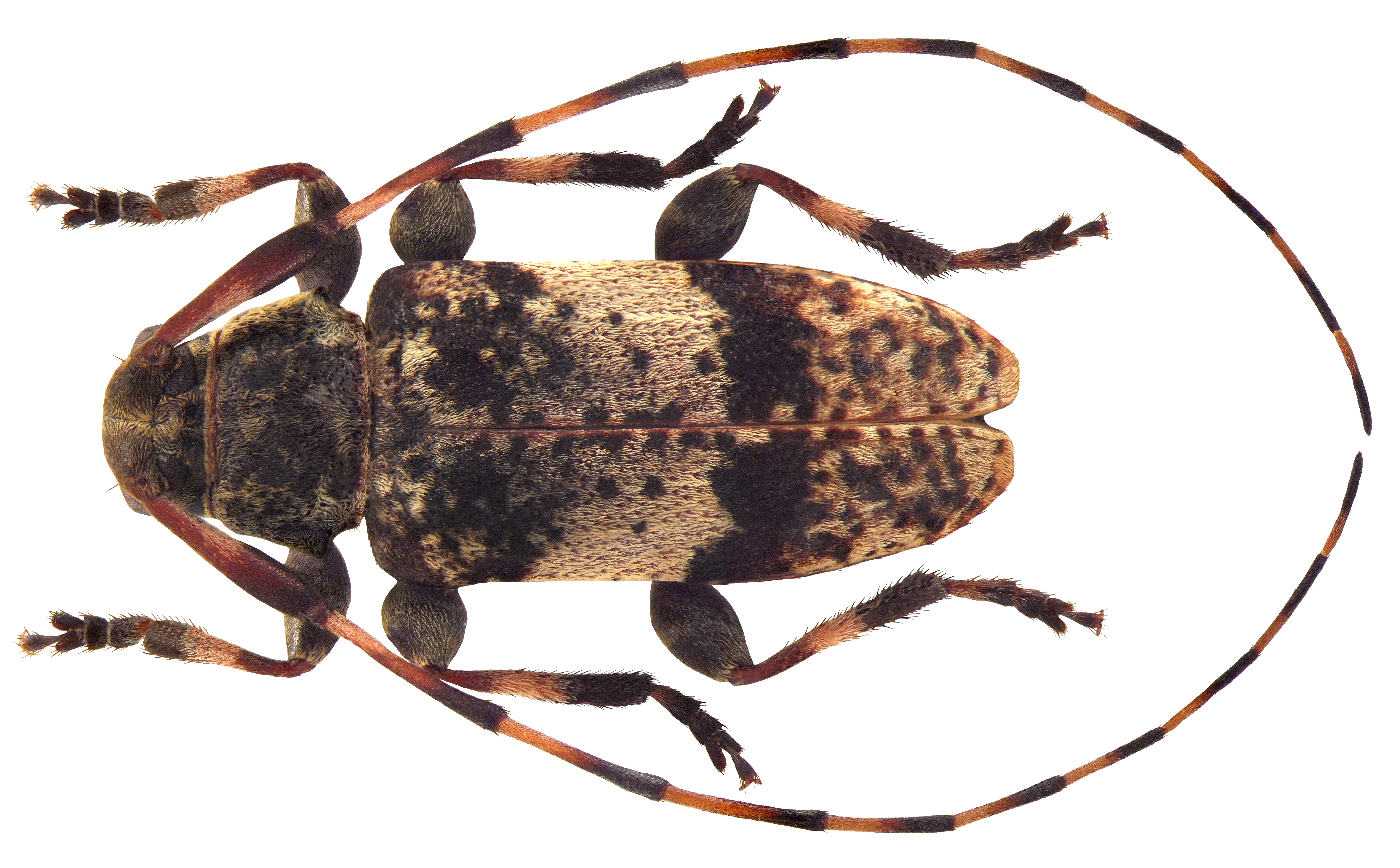 Familie: Cerambycidae Groesse: 6-10 mm Verbreitung: Europa Ökologie: Entwicklung polyphag in Laubholz und in Nadelholz (Picea, Abies) Fundort: Germania, Bayern, Oberfranken, Selbitz leg.det. U.Schmidt, 2005 Photo: U.Schmidt, 2010